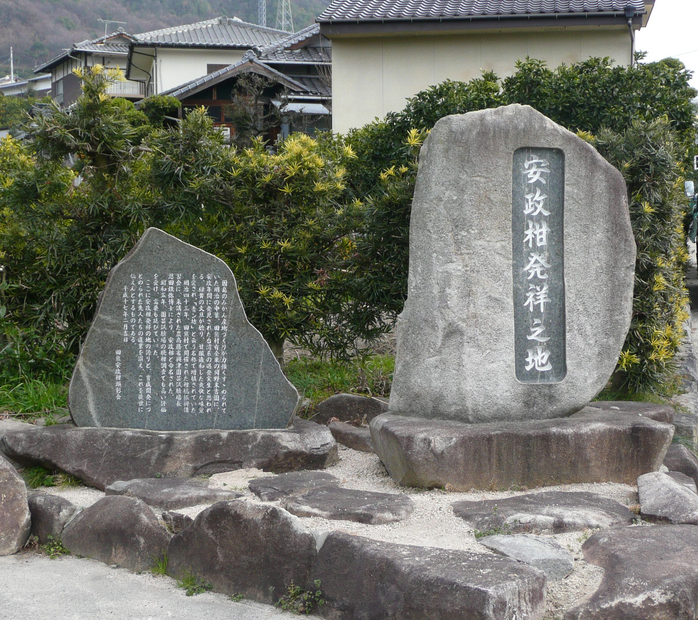 安政柑記念碑. 因島.